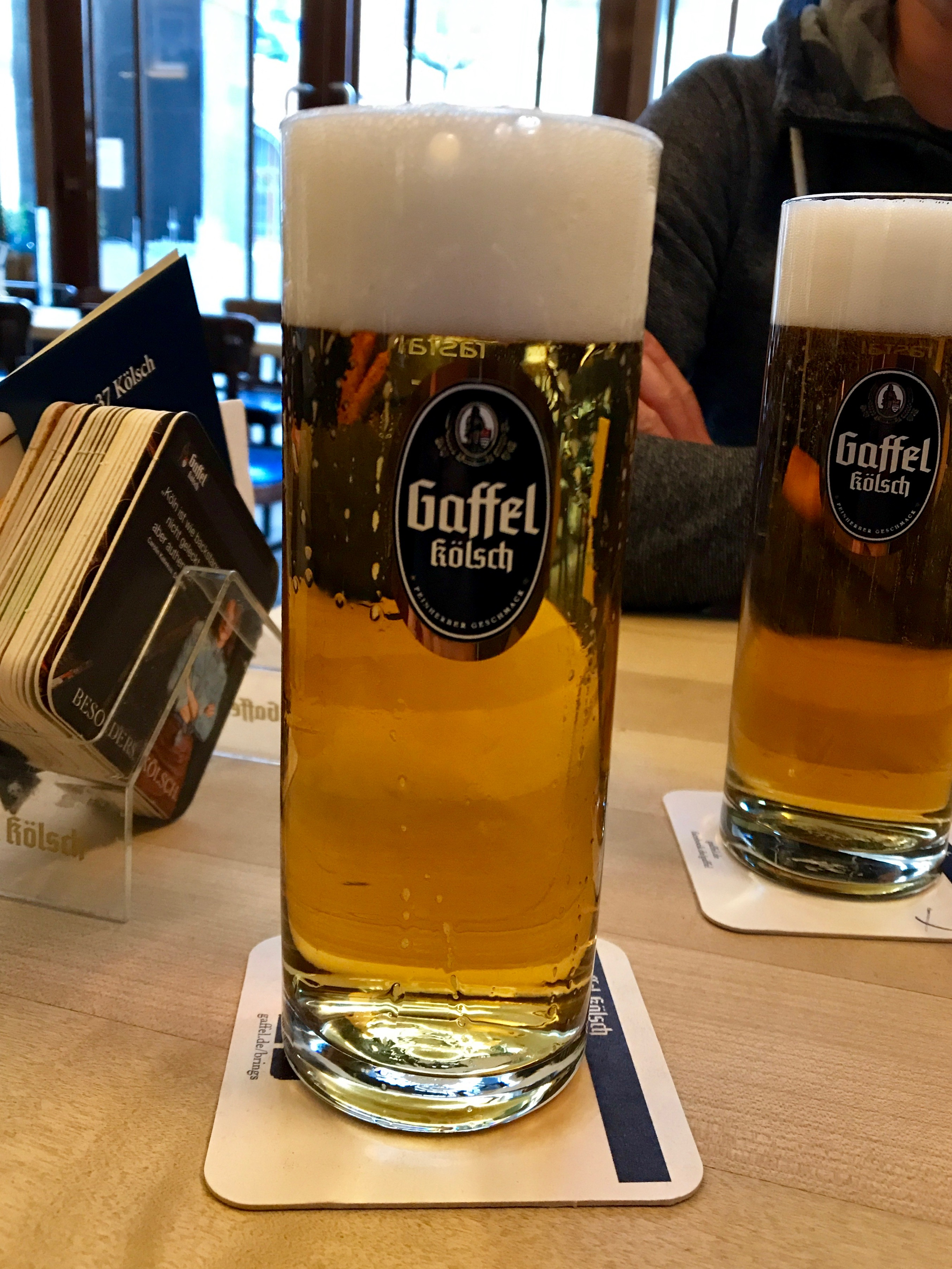 takhle to vypadá, když Vám načepují jedno v Berlíně